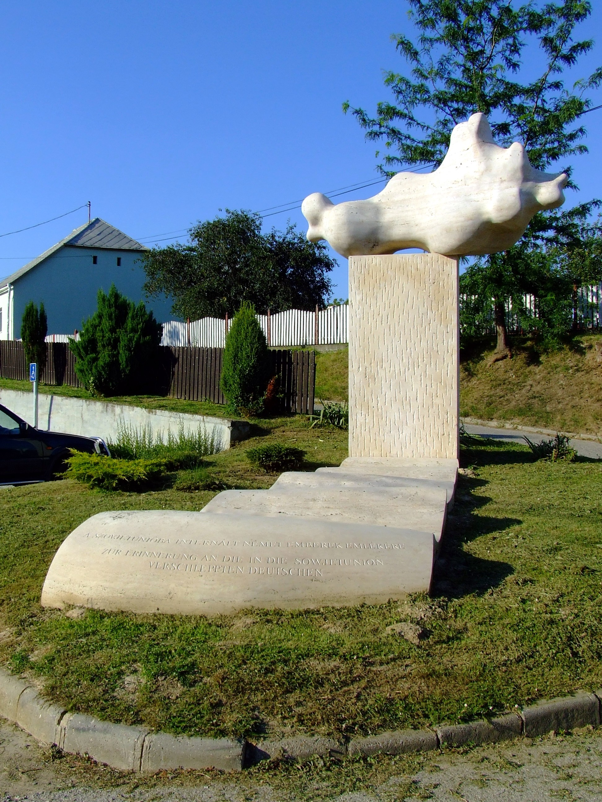 Emlékmű Szellőn (Baranya megye). A talapzat felirata: A SZOVJETUNIÓBA INTERNÁLT NÉMET EMBEREK EMLÉKÉRE / ZUR ERINNERUNG AN DIE IN DIE SOWJETUNION VERSCHLEPPTEN DEUTSCHEN